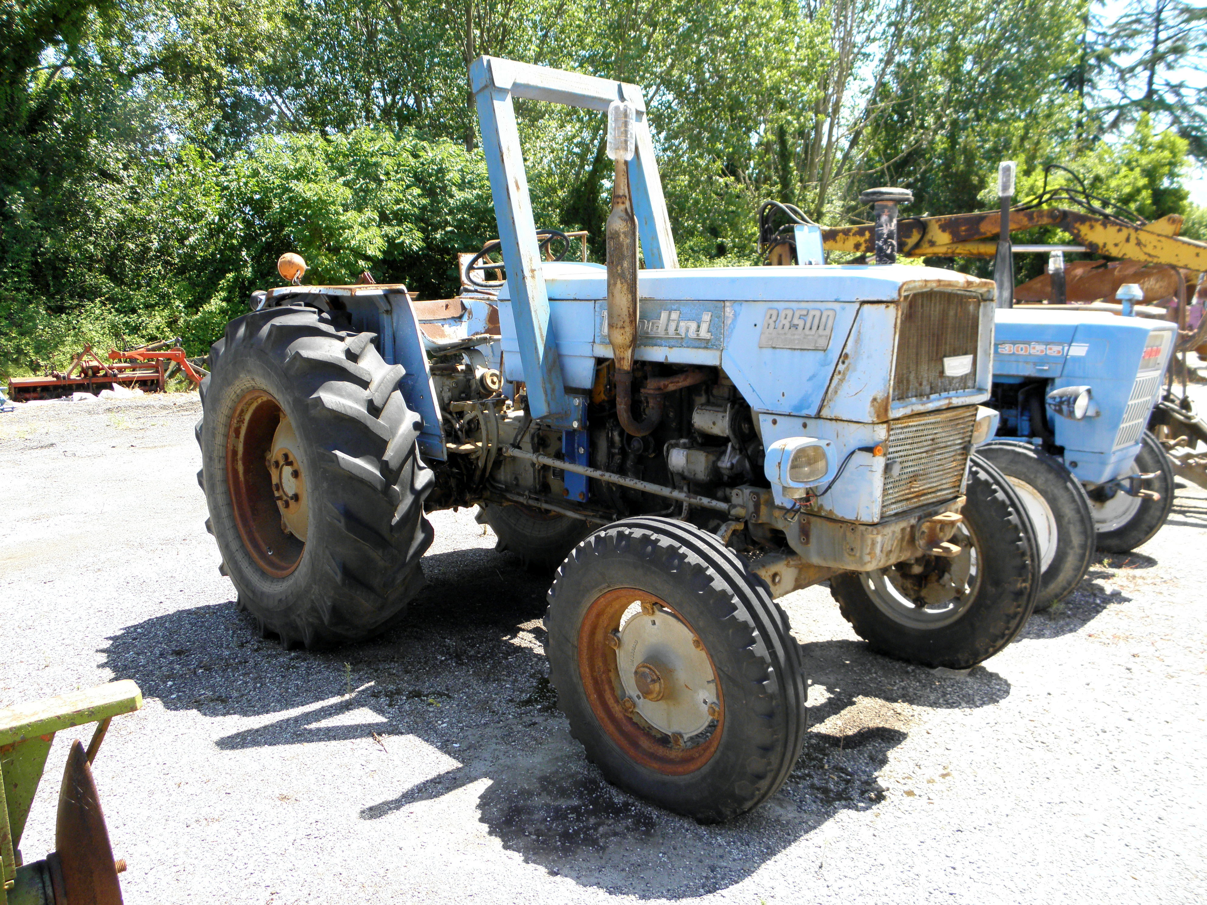 Rovigo, parco dell'azienda Macchine Agricole Previato: Landini R 8500 Special.